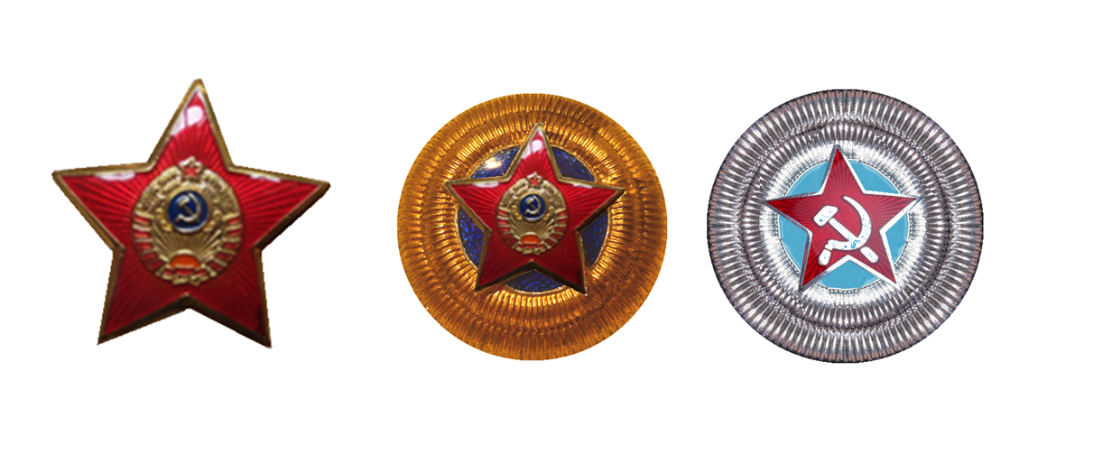 Кокарды1943